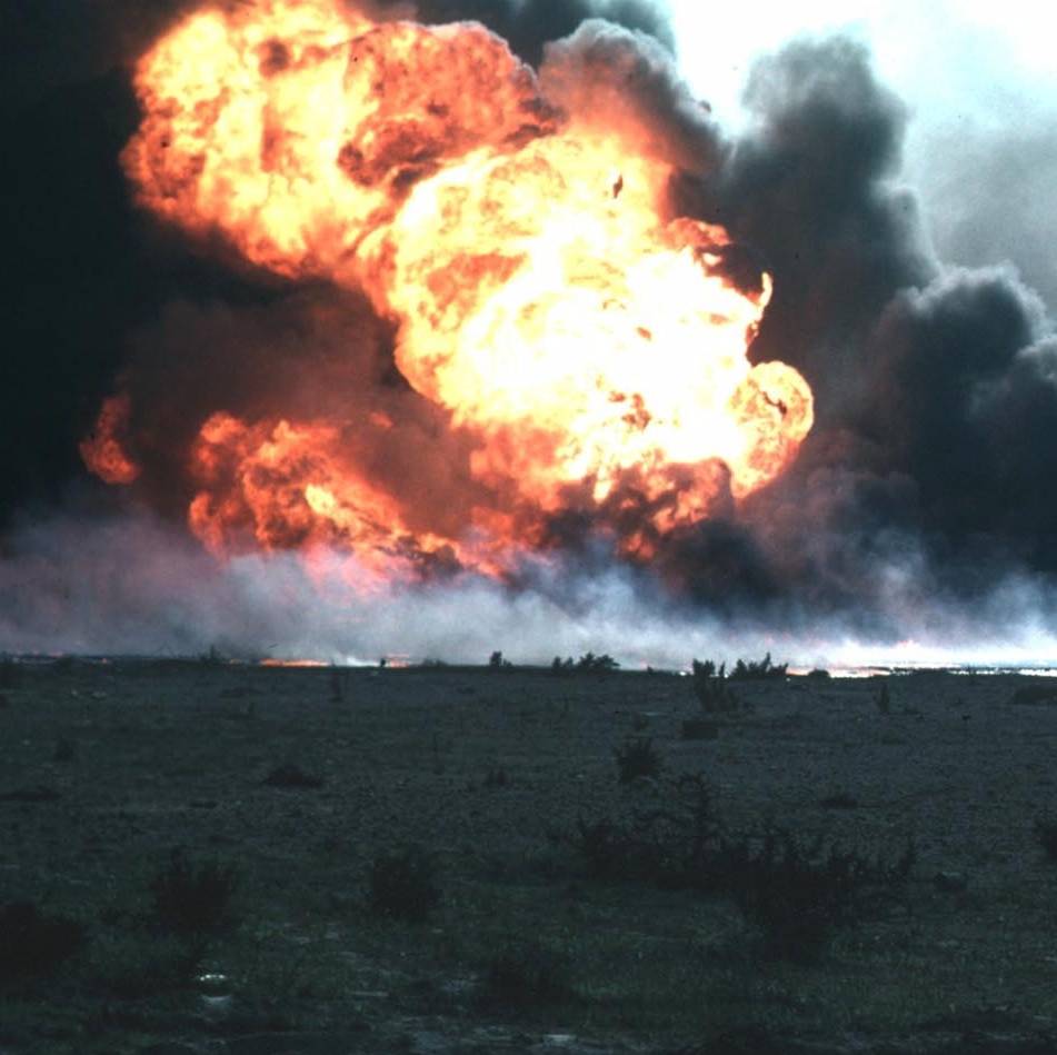 Burning oilfield during Operation Desert Storm, Kuwait